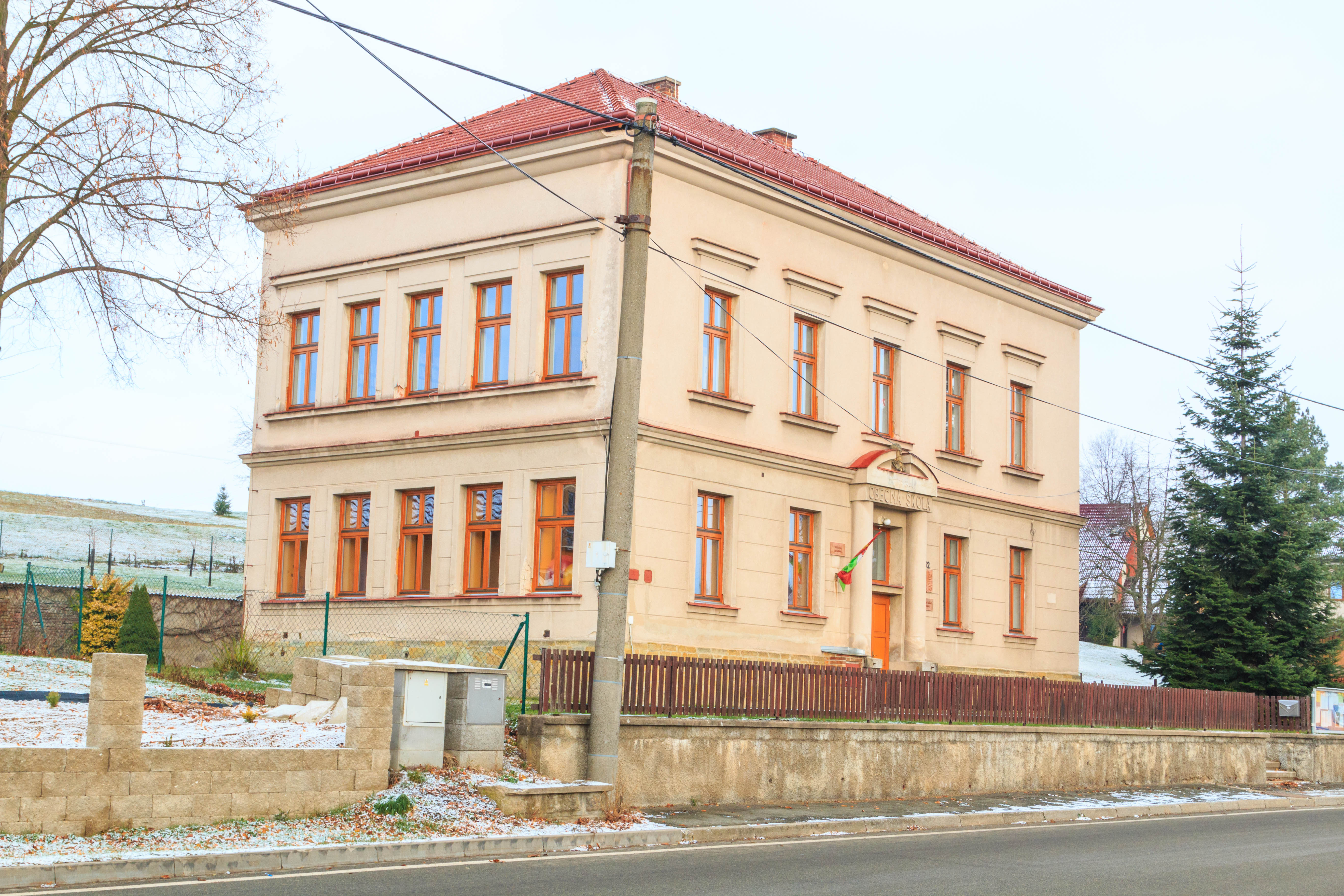 Lupenice - obecní úřad